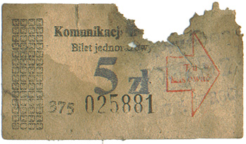 Bilet komunikacji miejskiej, Poznań l. 71.(?)